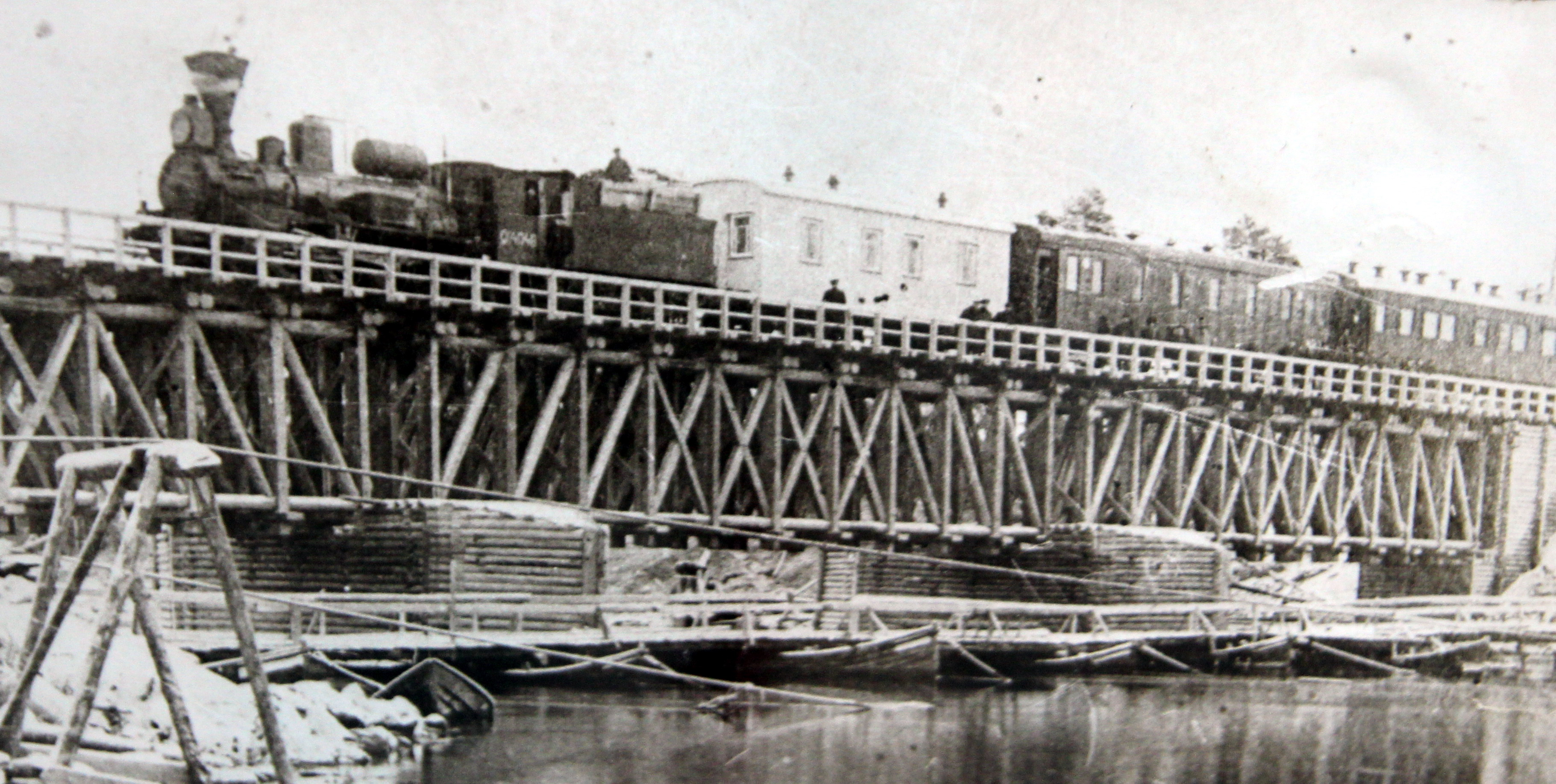 Первый поезд на Мурманской железной дороге